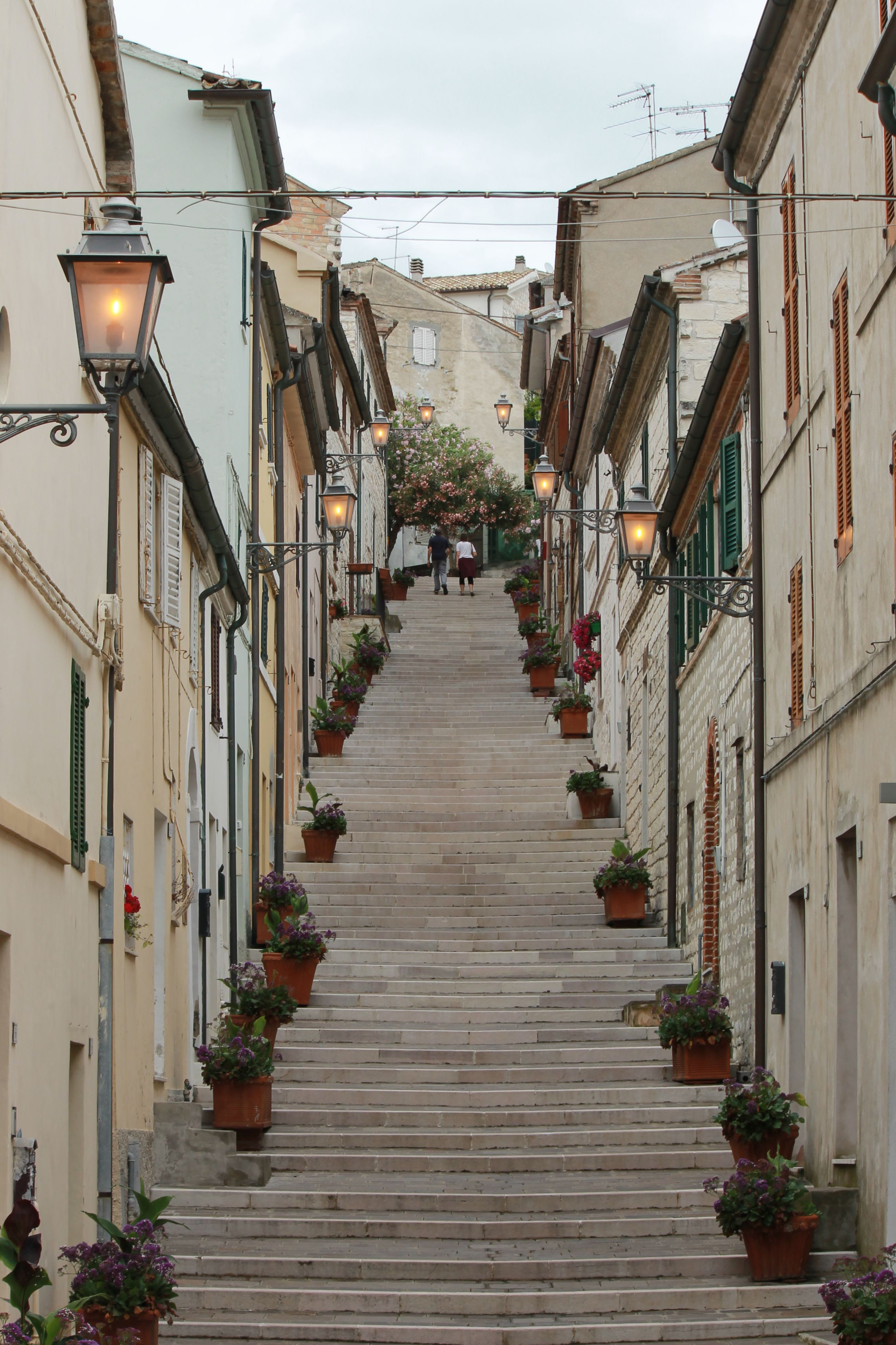 Scalinata caratteristica di Numana chiamata "La Costarella"